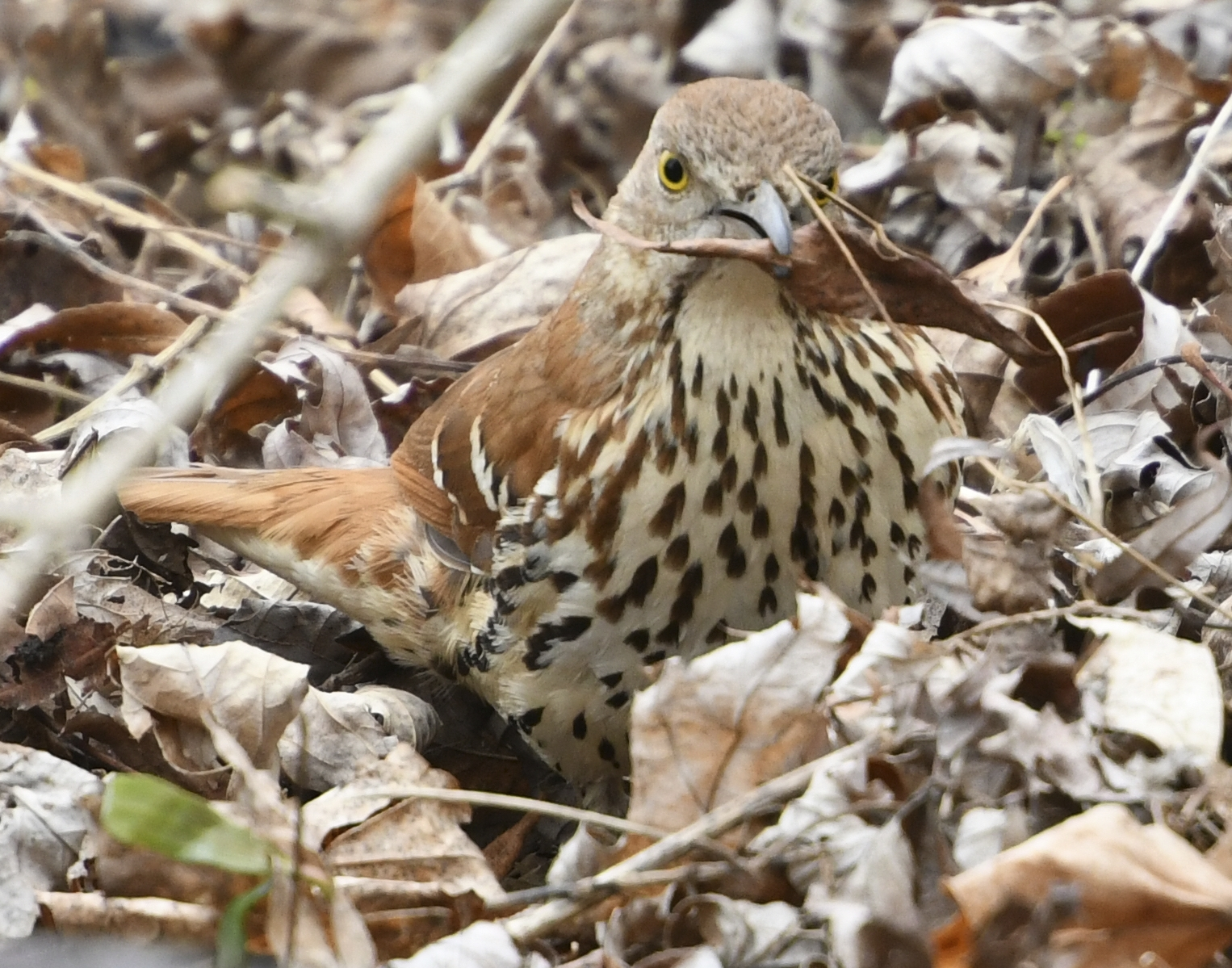 Тремблер прямодзьобий (Toxostoma rufum) у парку полковника Семюела Сміта в Торонто шукає поживу в лісовій підстилці